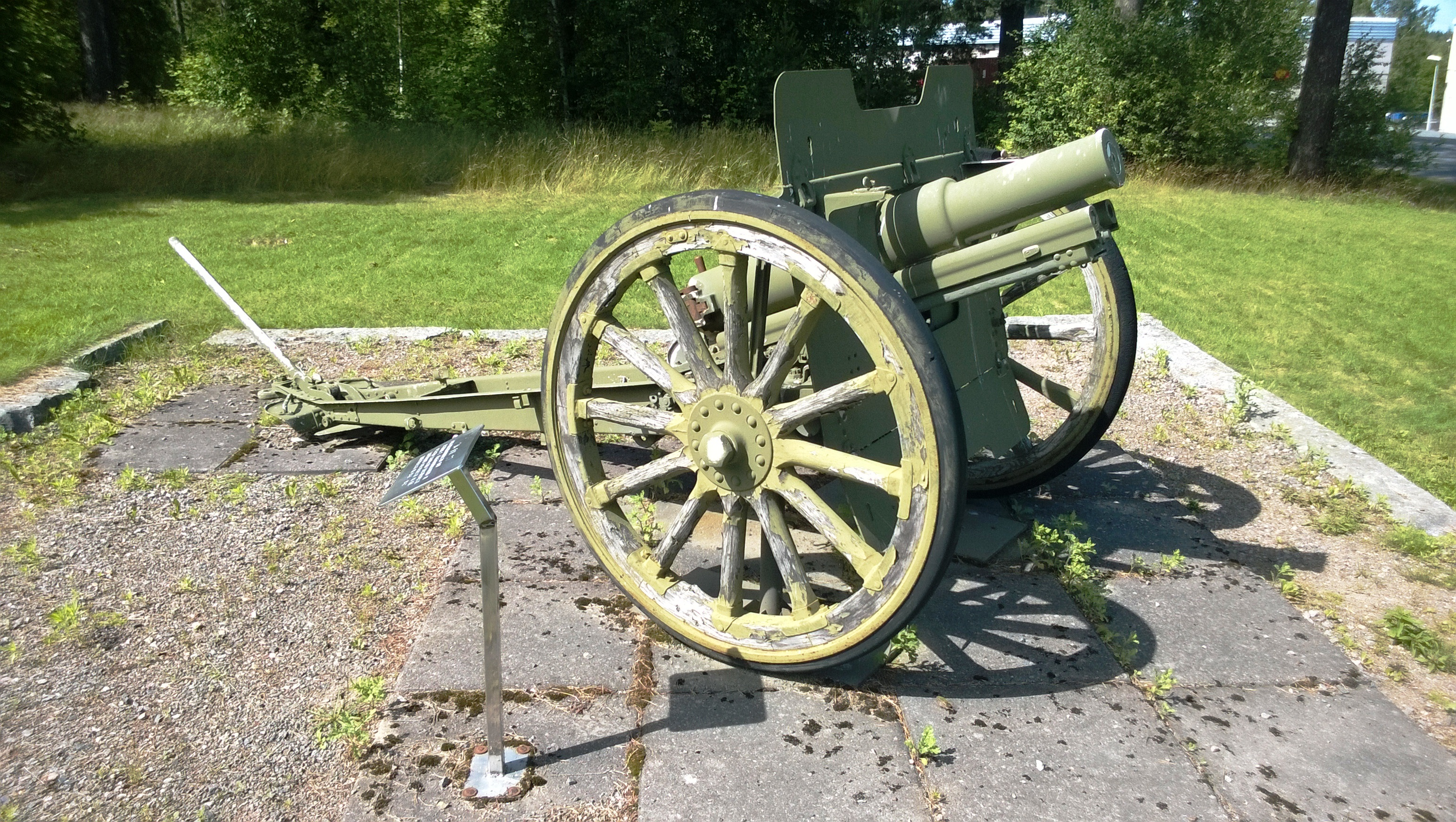 76RK27 oli Kevyt Patteristo 11:n aseena 1. Jääkäriprikaatin ja Osasto Laguksen taisteluissa Laatokan Karjalassa, Aunuksessa ja Itä-Karjalassa vuosina 1941–1942.(Kuva mehelin, Kevyt Patteristo 11:n muistomerkki Parolan Jääkäritykistörykmentissä.)